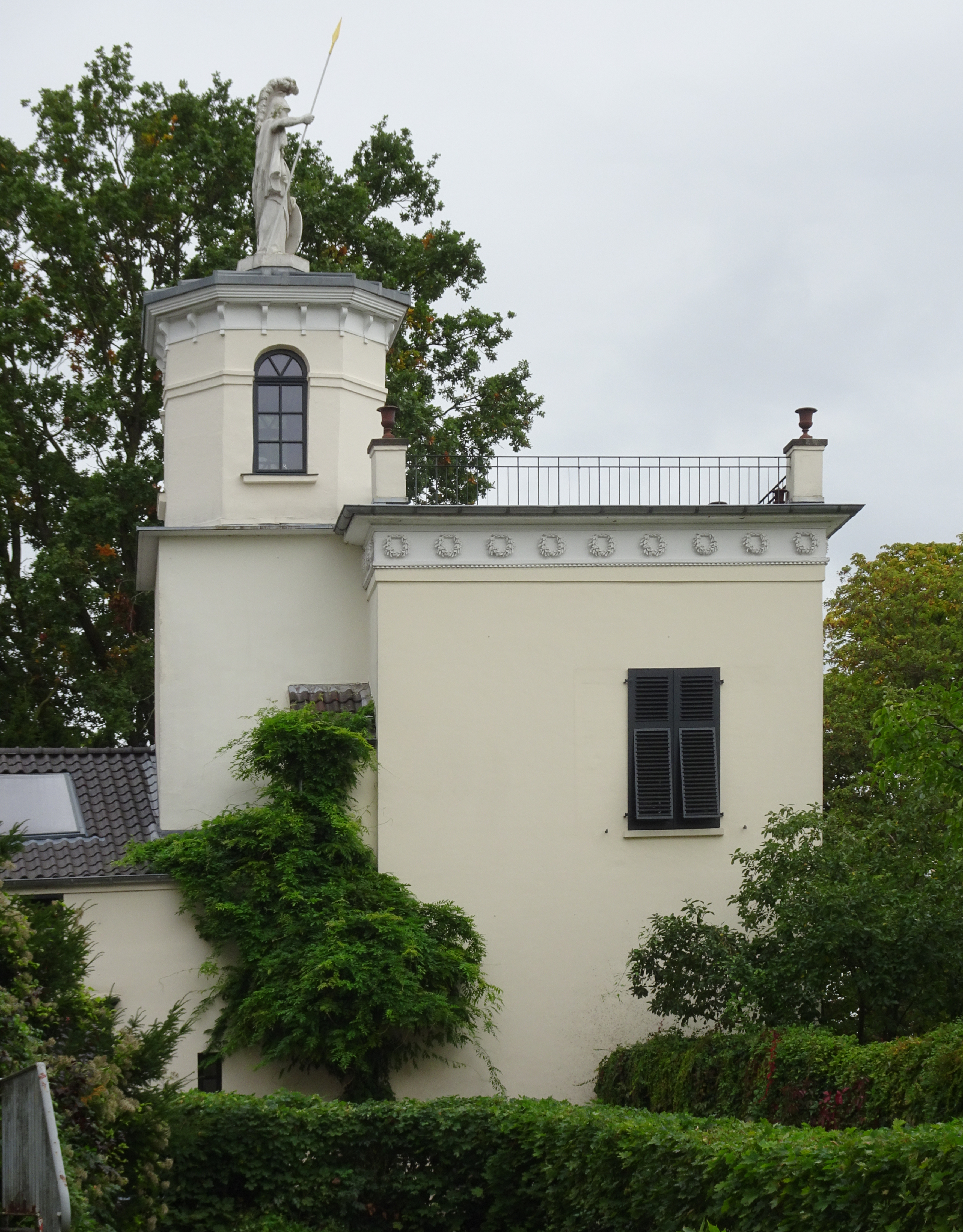 Kleve, Regenbogen 11, Belvedère met Minervabeeld op de heuveltop achter Haus Koekkoek